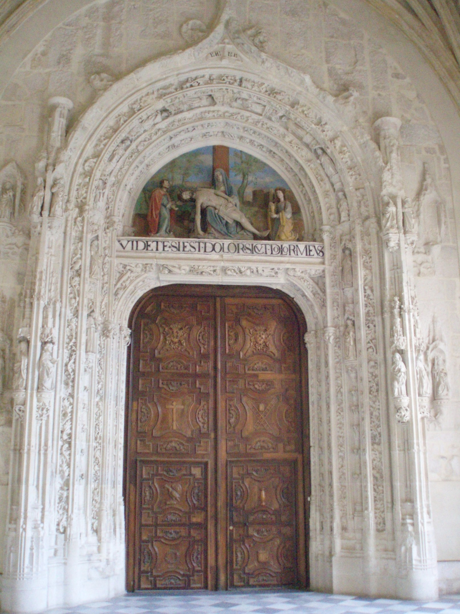 Entrada a la iglesia del Monasterio de El Paular (Sierra de Guadarrama, España).